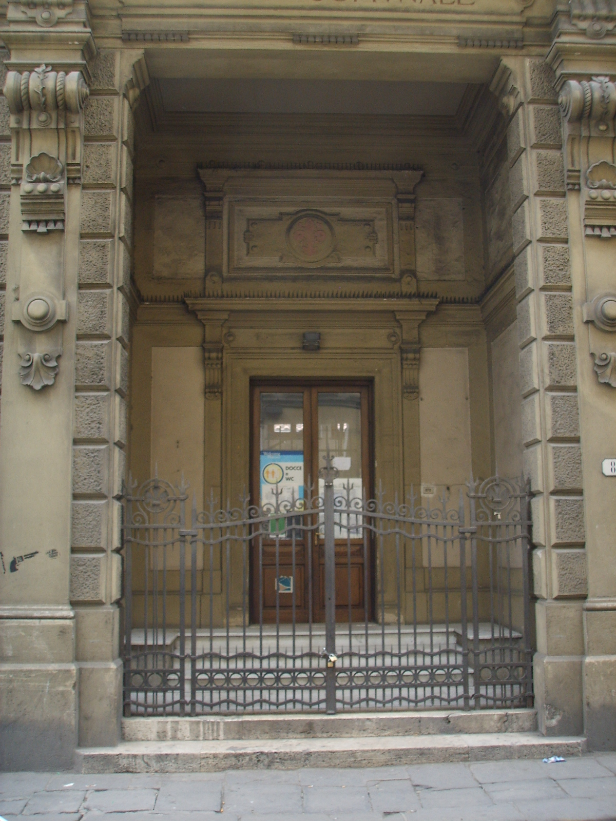 Bagno comunale, firenze